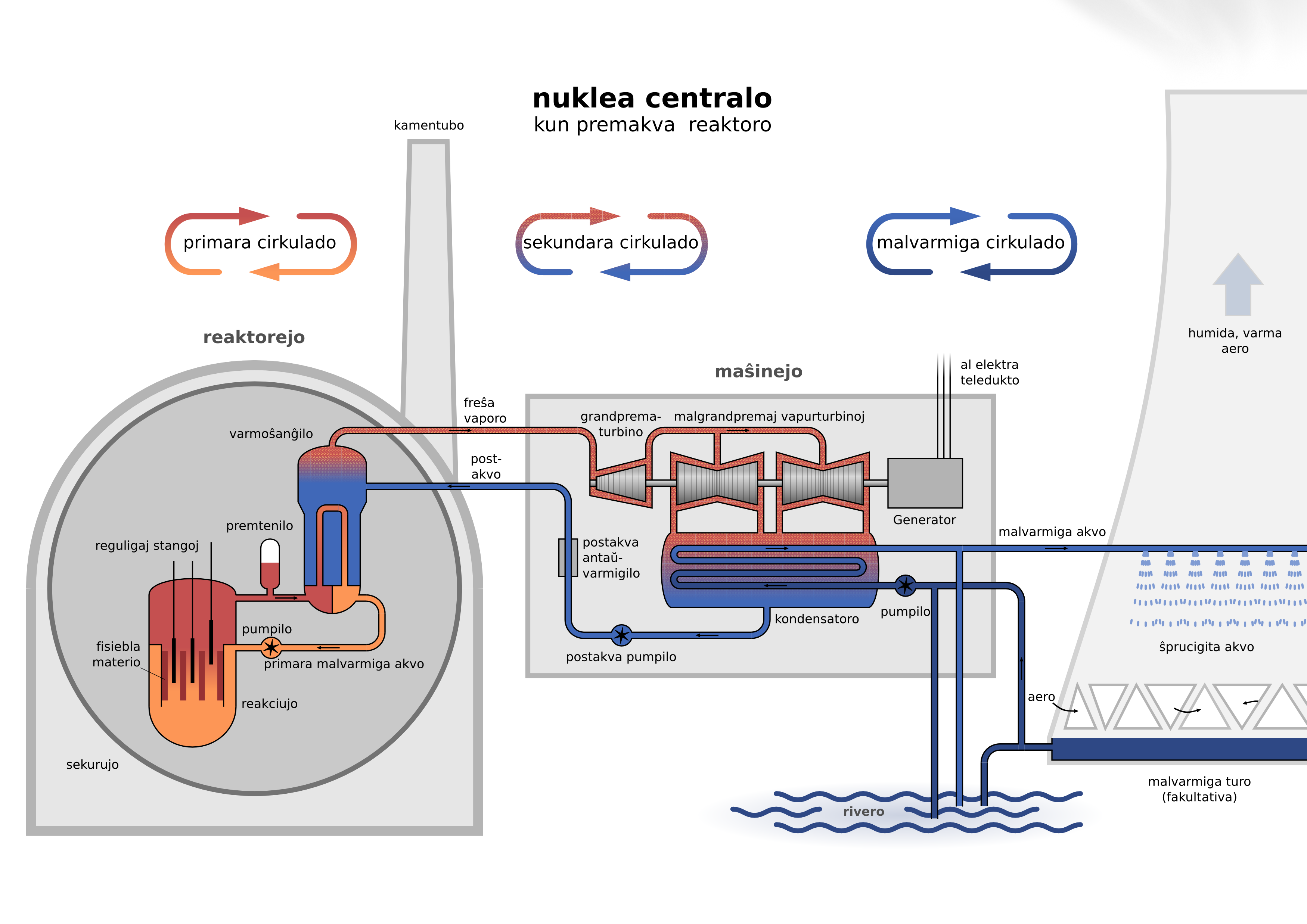 Skemo de nuklea centralo kun premakva reaktoro